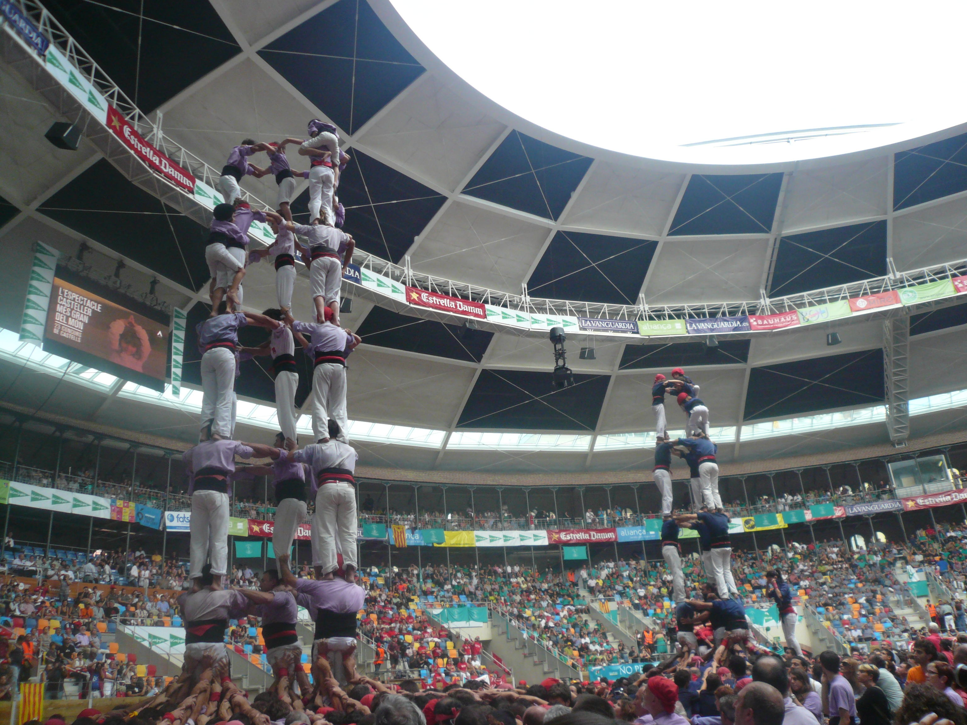 Concurs de Castells 2010, a la plaça de Toros de Tarragona, rebatejada com a Tarraco Arena. Object location41° 06′ 51.64″ N, 1° 14′ 43.03″ E